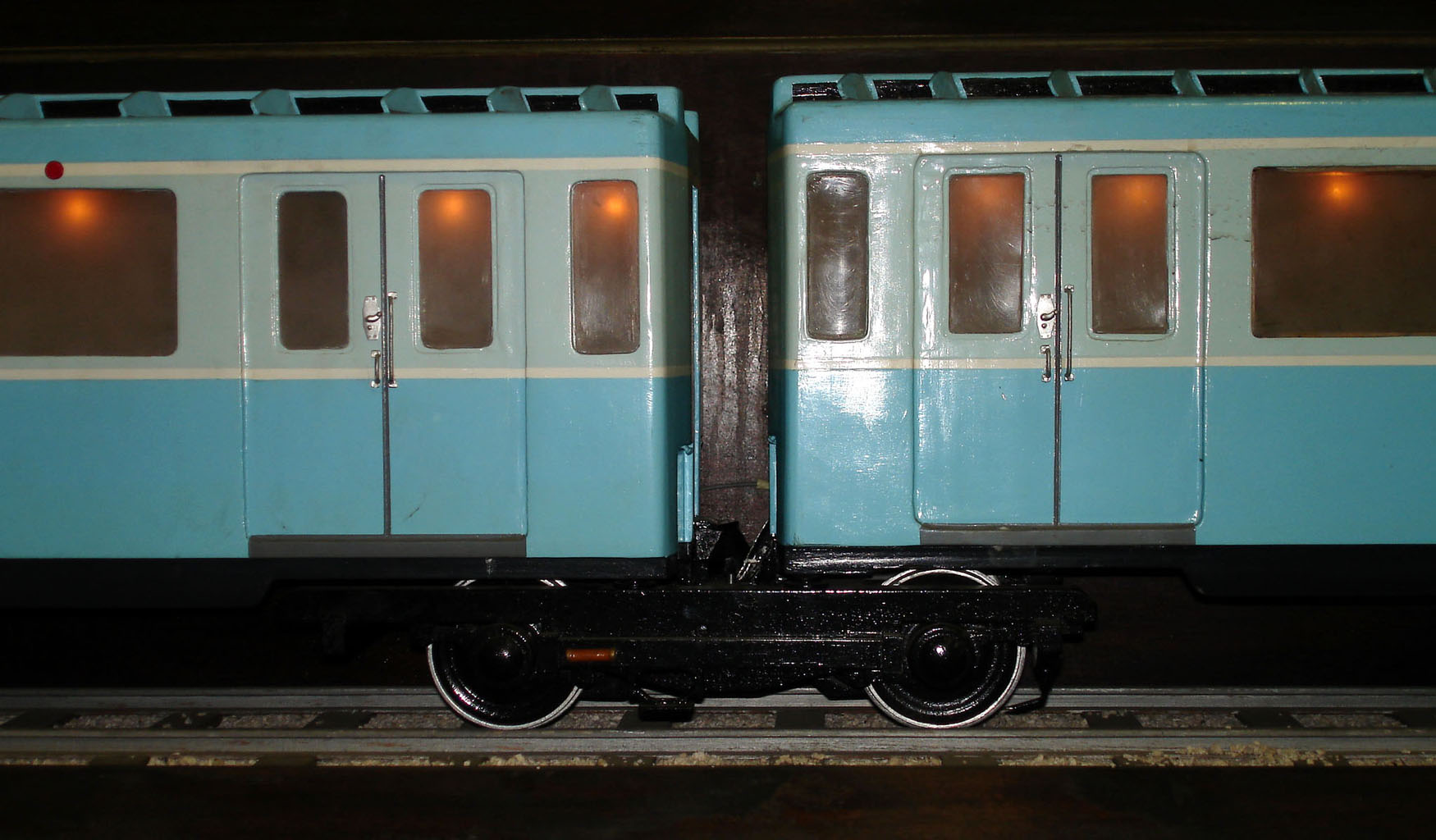 Maquette du MA 51 (matériel articulé) Journées du patrimoine le 15/09/2007 à l'AMTUIR, Colombes, France Photo personnelle (own work) de Clicsouris